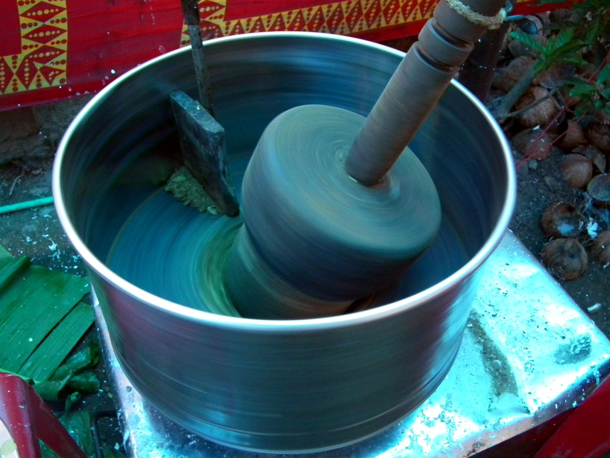 A wet grinder.